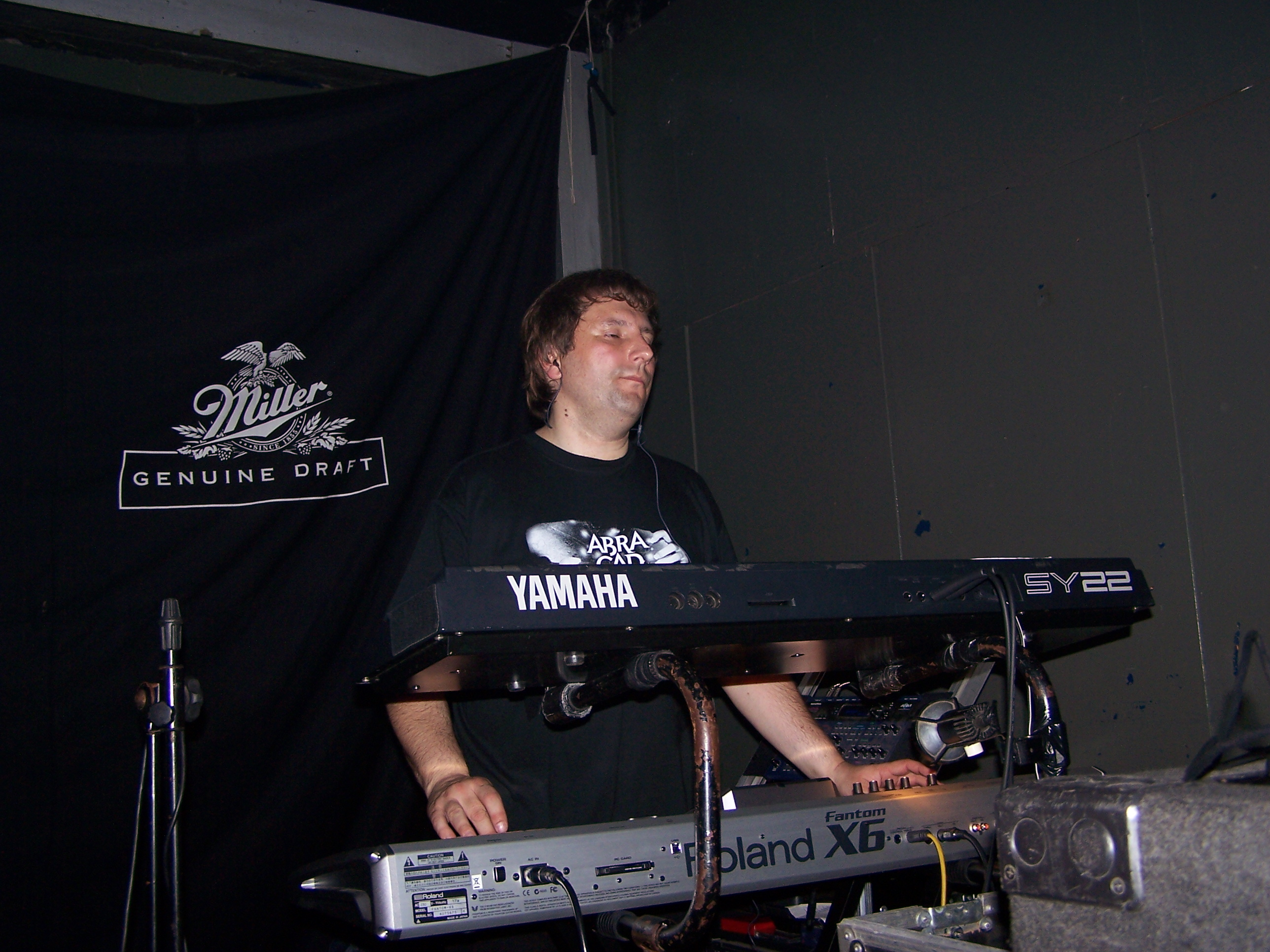 Michał Rolinger - grający na instrumentach klawiszowych w zespole Closterkeller podczas koncertu w katowickim Mega Clubie.